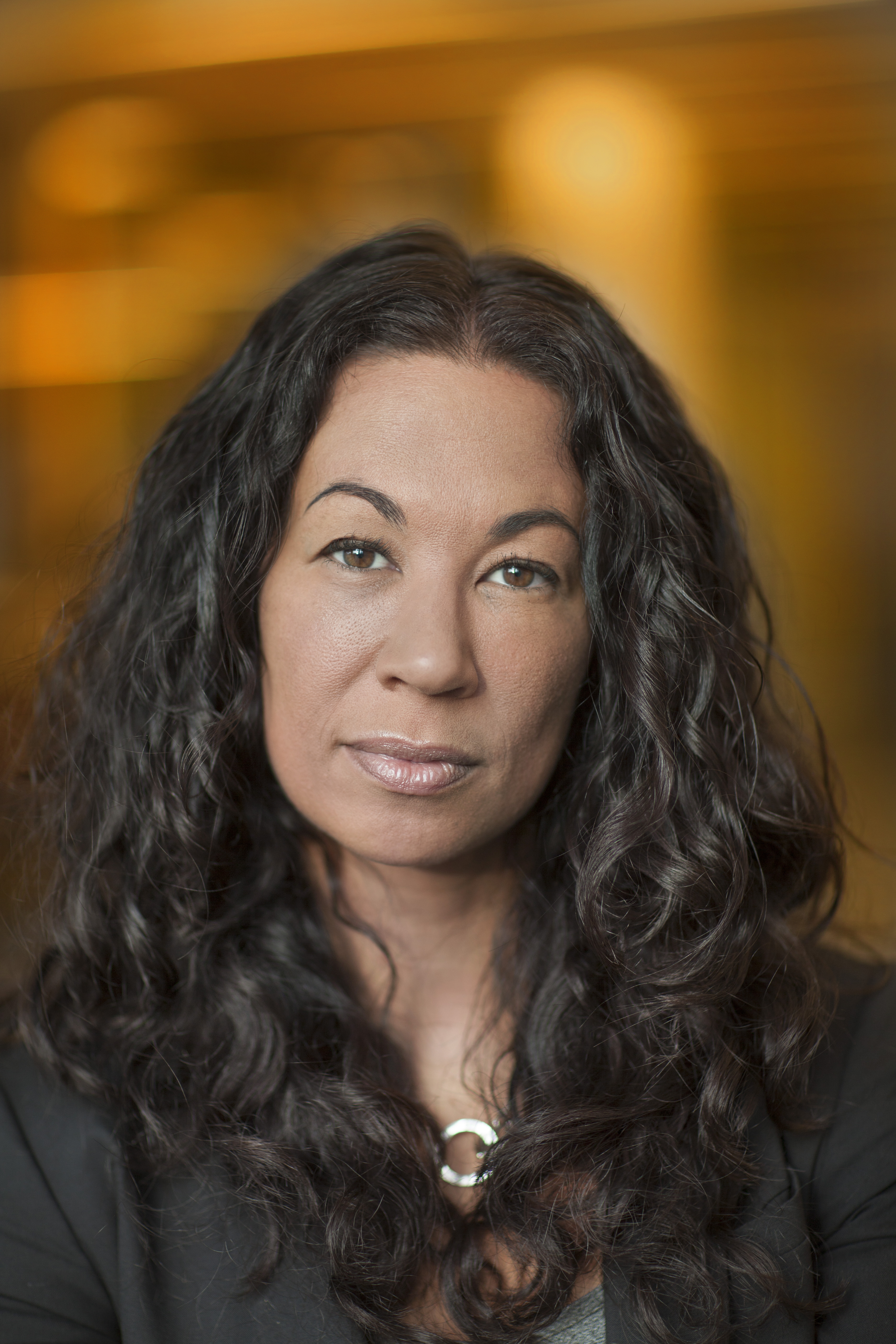 Den svenska journalisten Magda Gad.